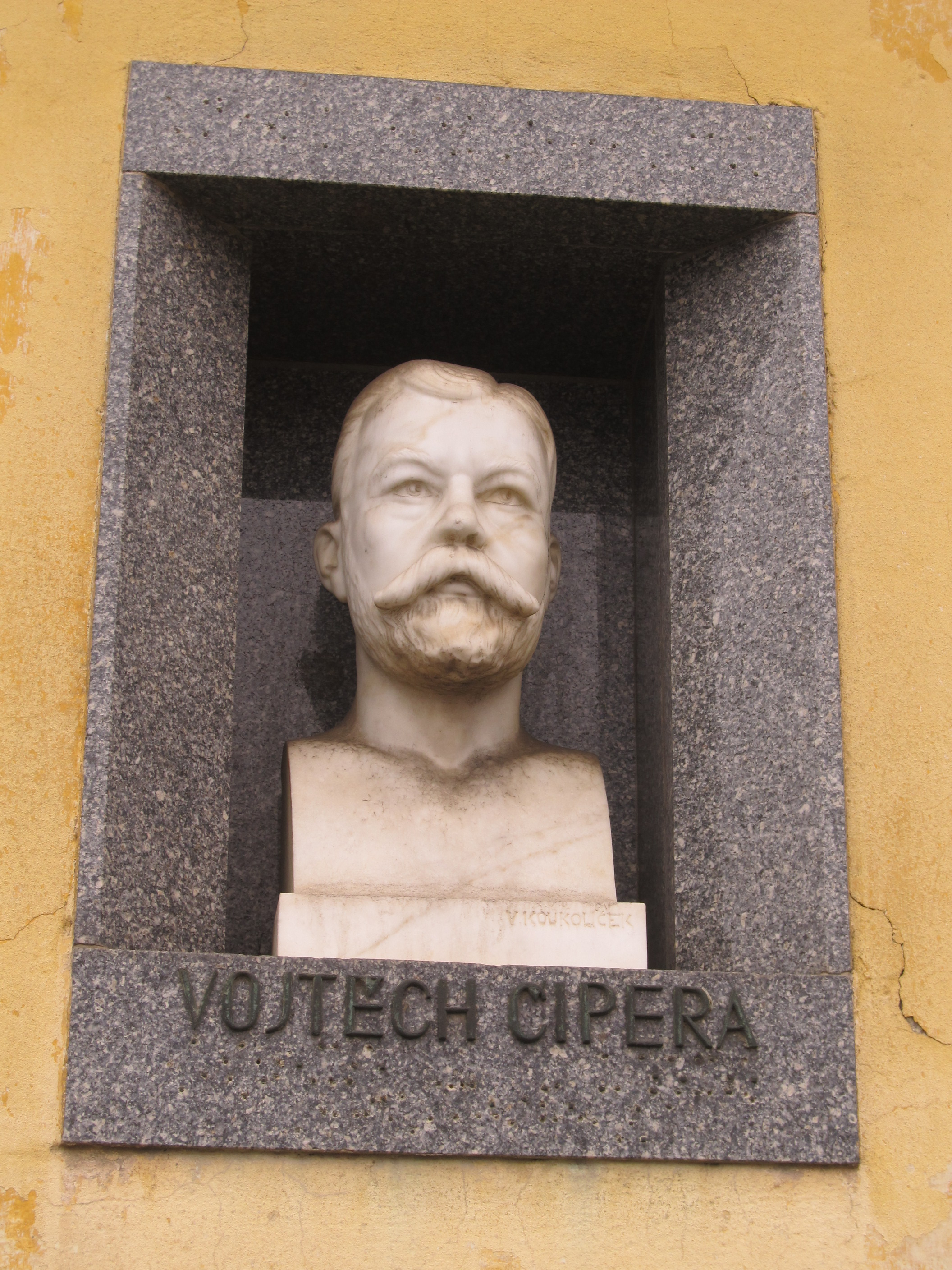 Vojtěch Čipera byl prvorepublikovým poslancem a senátorem